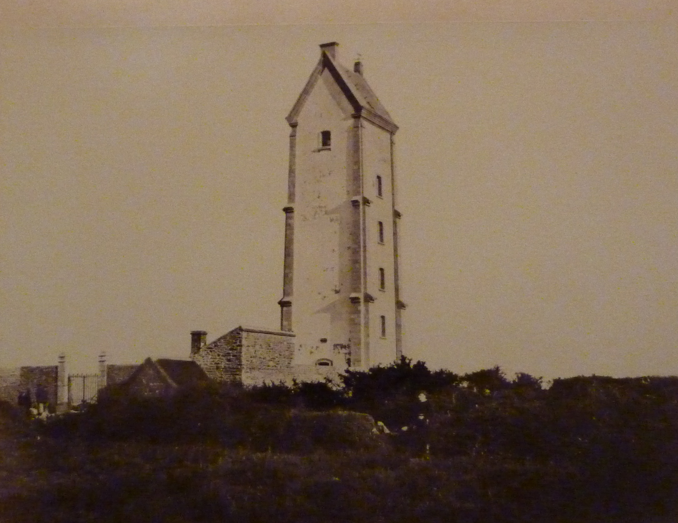 Plouguerneau : le fanal de Lanvaon vers 1865 (photographie de Jules Duclos)